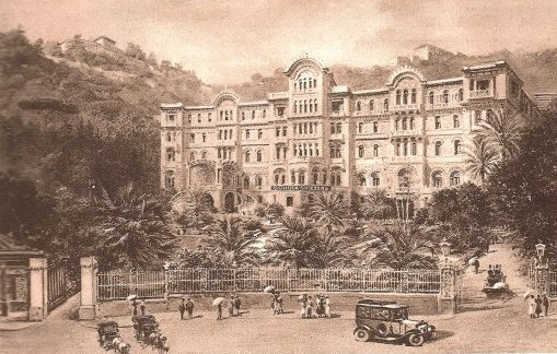 Villa Maria (Napoli) - Edificio in stile liberty costruito fra il 1899 ed il 1901 per essere il Grand Hotel Eden, è stato ben presto suddiviso in appartamenti per civili abitazioni, quale è tuttora. Dal 1933 (anno in cui si può datare l'immagine di questa cartolina) fino al 1967 il palazzo ha ospitato al pian terreno la Scuola Svizzera di Napoli.